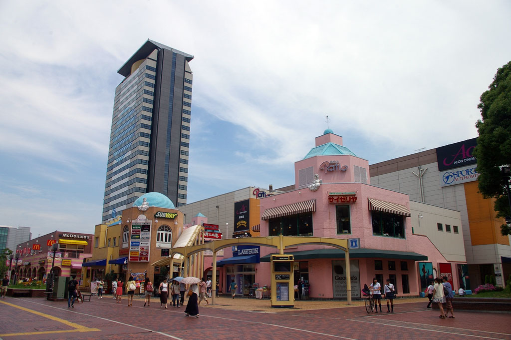 イオンシネマ多摩センター外観